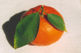 Eigen foto Fruggo (vrijgegeven onder GNU). Foto gemaakt maart 2004 in Benidorm. Spaanse Clementijn.